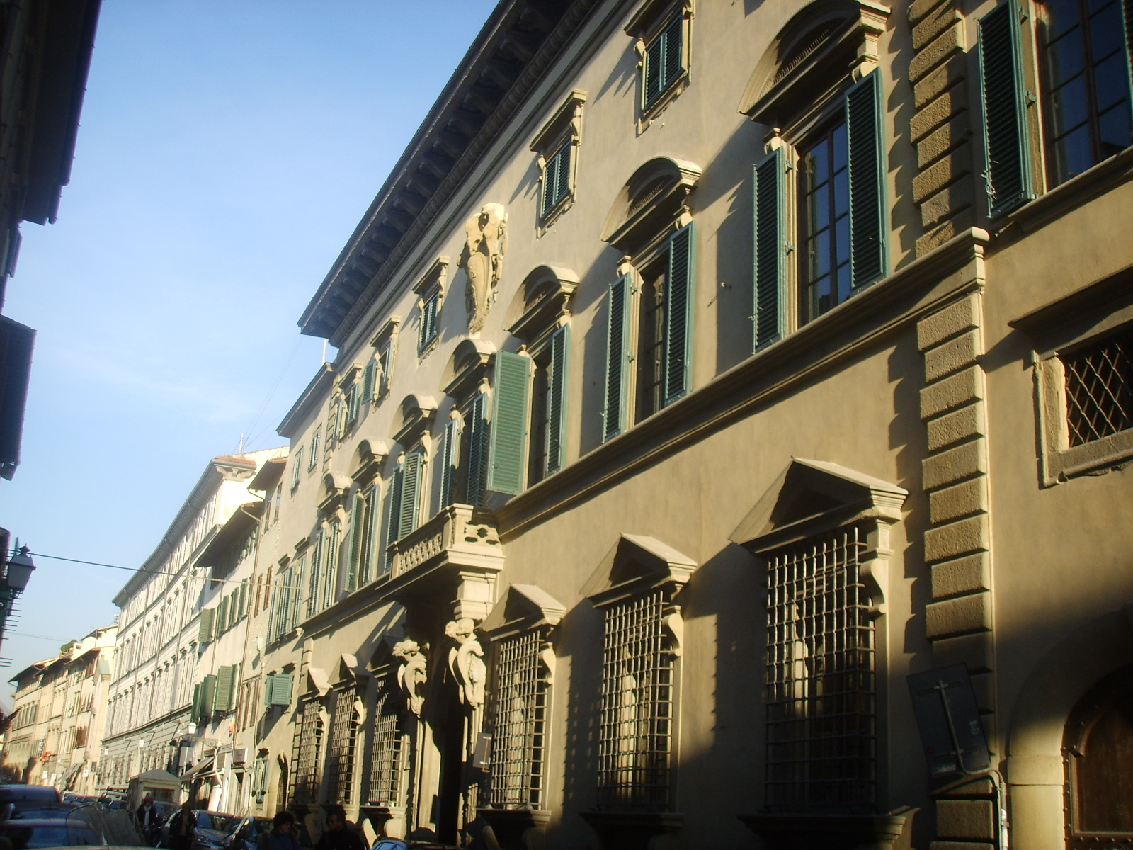 Palazzo_Fenzi palace in Florence